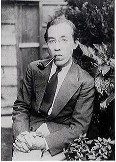 西脇順三郎（1894年～1982年）、詩人・英文学者。新潟県の生まれ。慶應義塾大学理財科卒業後、オックスフォード大学で英文学を専攻。戦後、4回にわたってノーベル文学賞の候補になる。